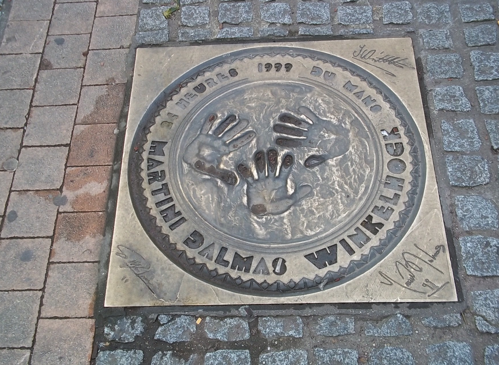 Plaque de bronze des empreintes des vainqueurs des 24 heures 1999